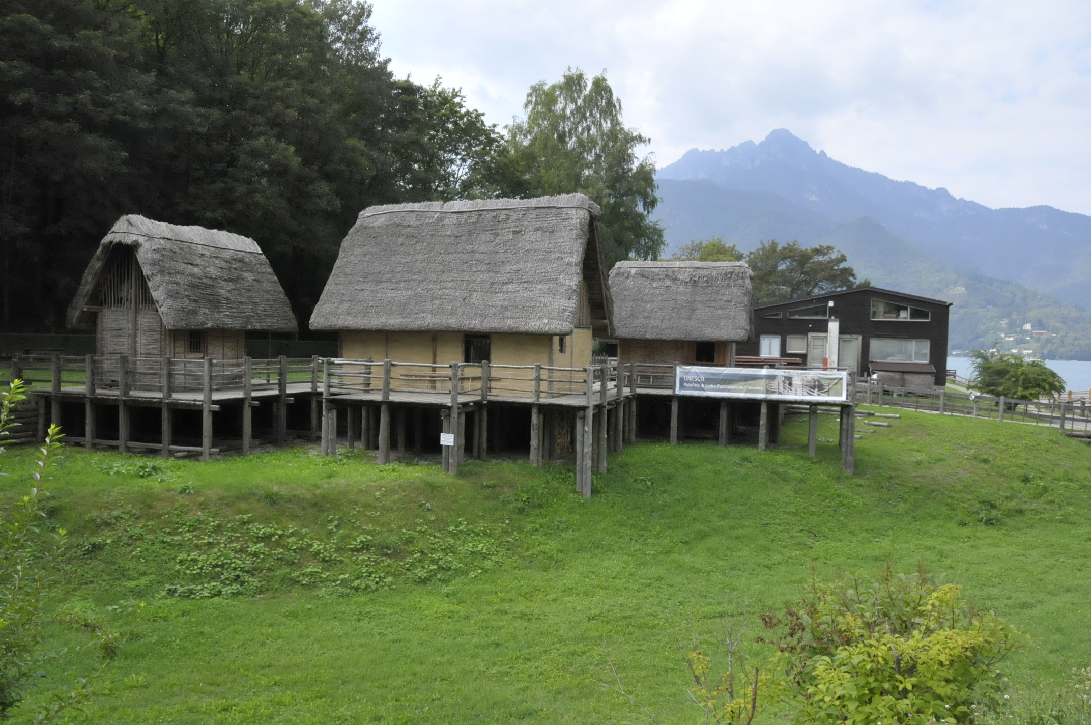 Ledrosee, Pfahlbauten